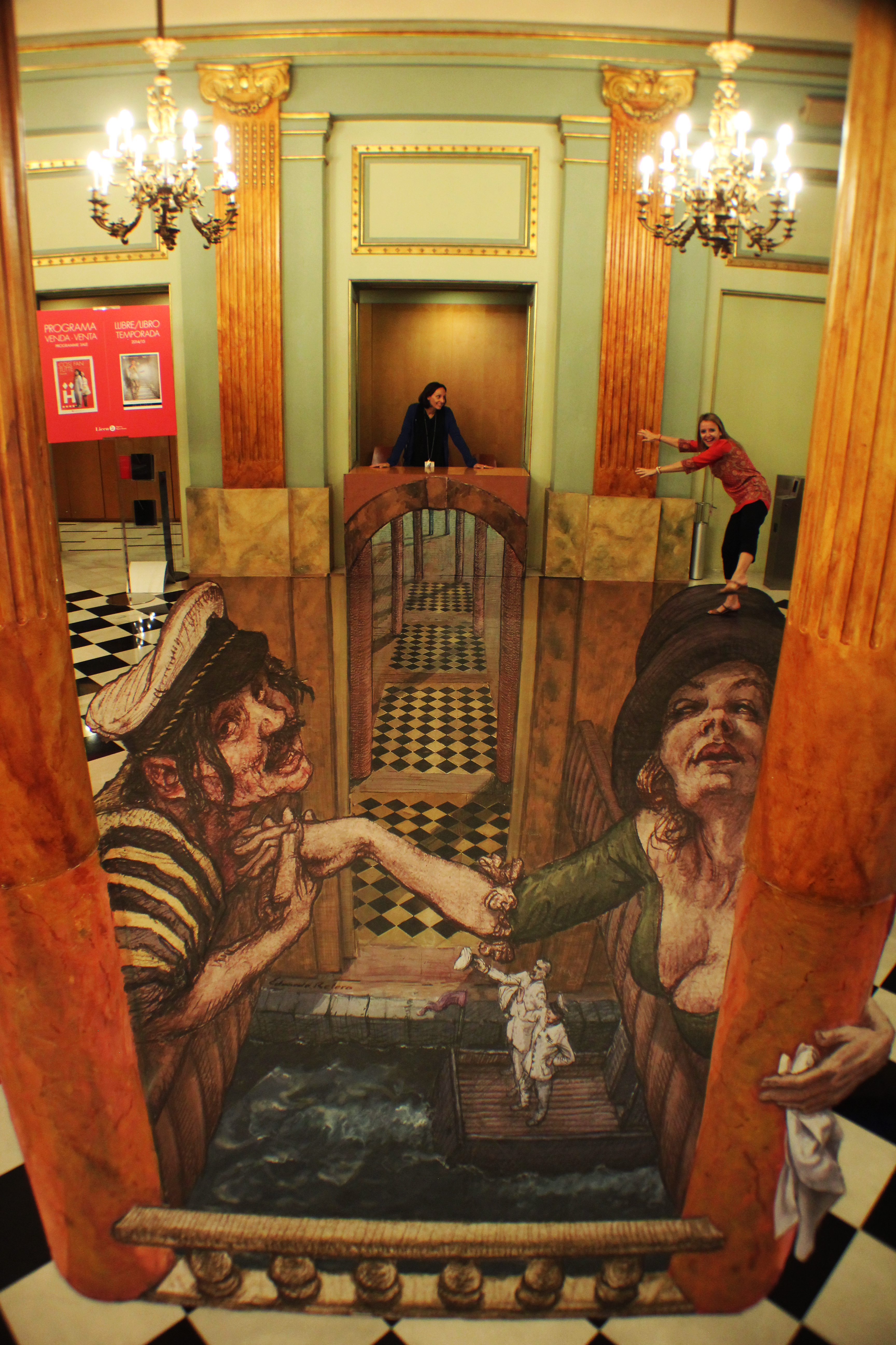 obra anamórfica realizada en 2015 para el Gran Teatre del liceu, Barcelona . para la ópera de Mozart "Così fan tutte"